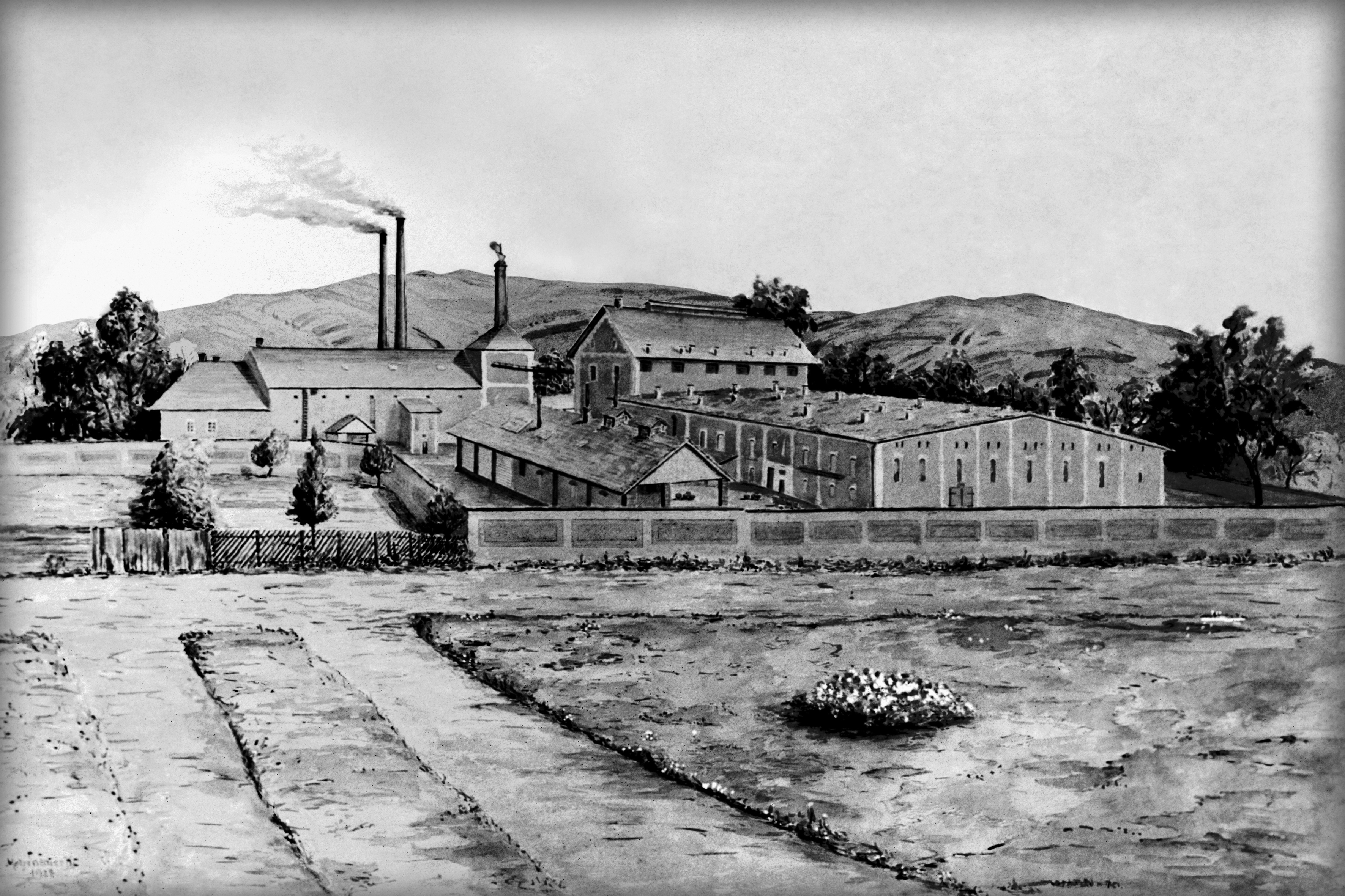 Malba pivovaru kolem roku 1911 (Vyškov- czech republic)